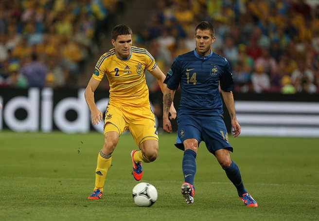 Jérémy Ménez en équipe de France lors de l'Euro 2012 contre l'Ukraine.